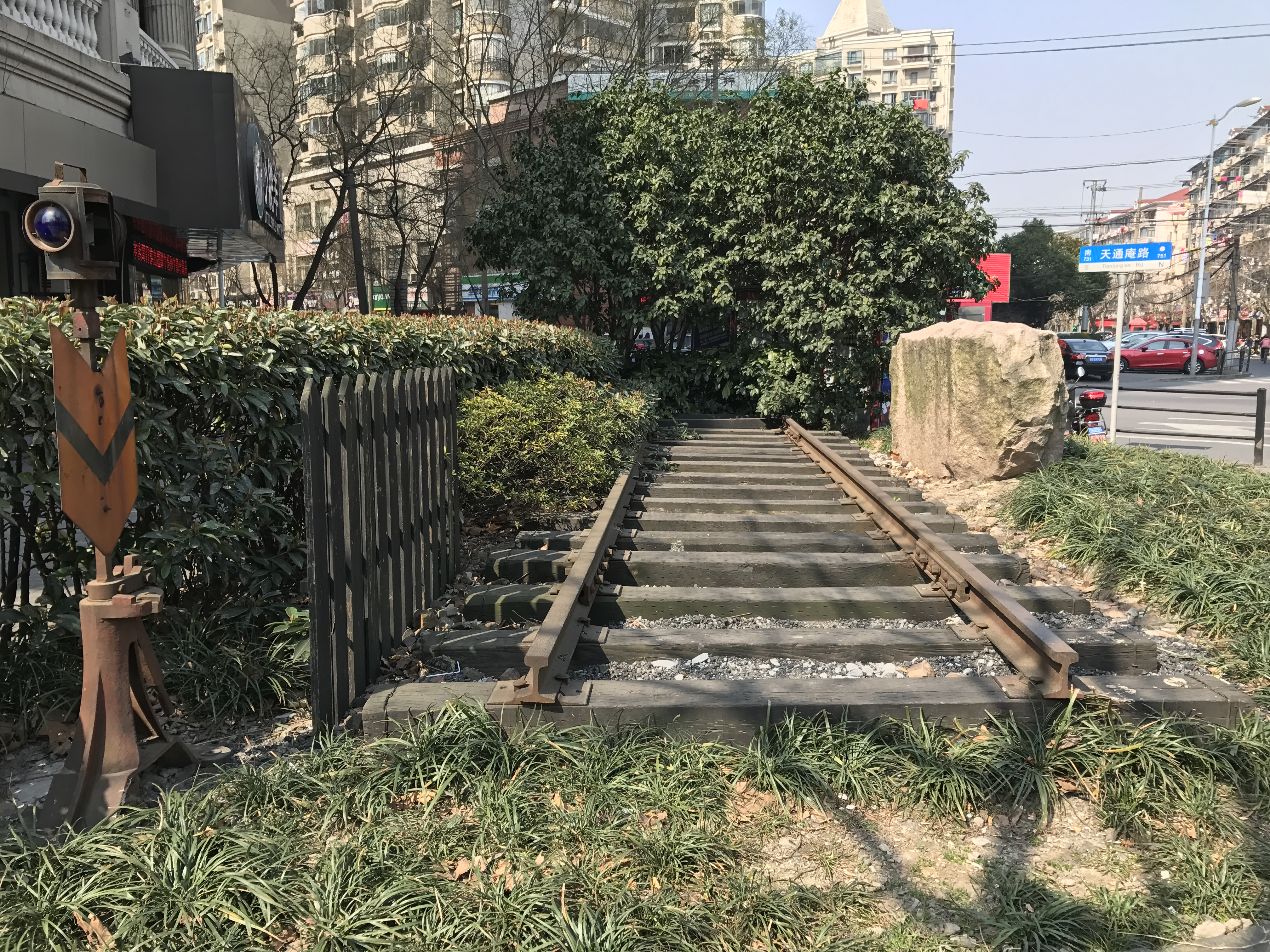 淞沪铁路天通庵站遗址 四川北路、同心路、宝山路接壤处